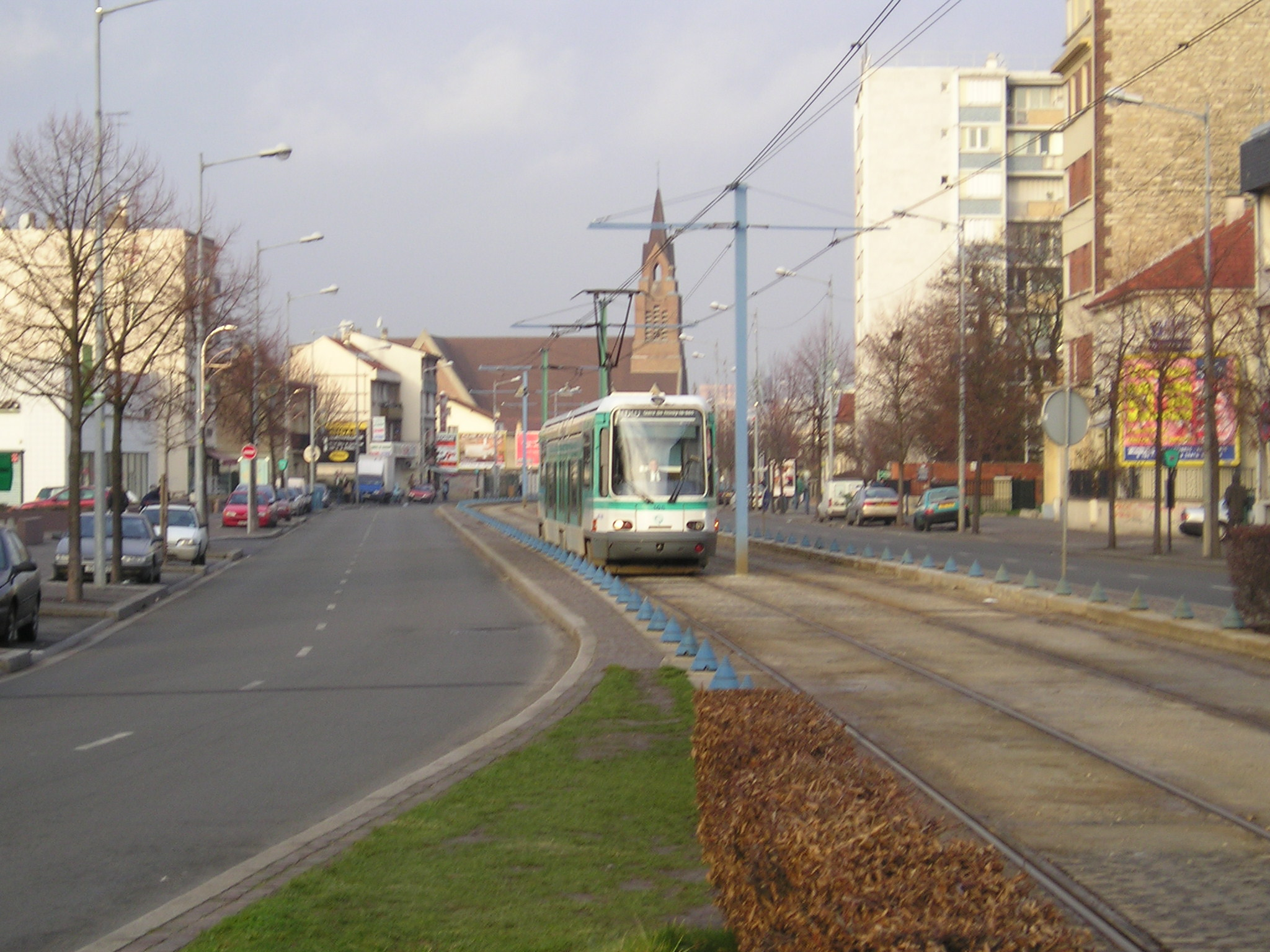 Tramway de la ligne T1 arrivant à la station Drancy Avenir. Photographie de User:Sebjarod, 10 janvier 2004